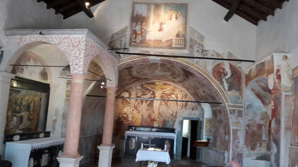 Интерьер старой церкви XII в. San lorenzo в Rossino, провинция Lecco, епархия Bergamo